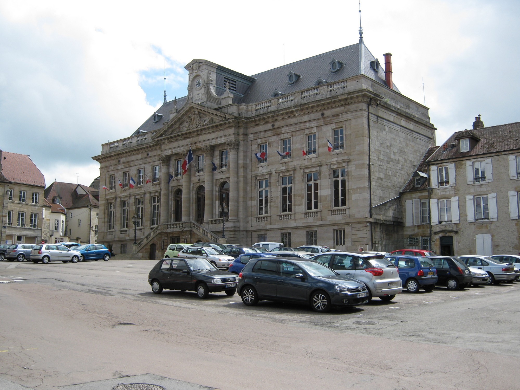 Hôtel de ville de Langres